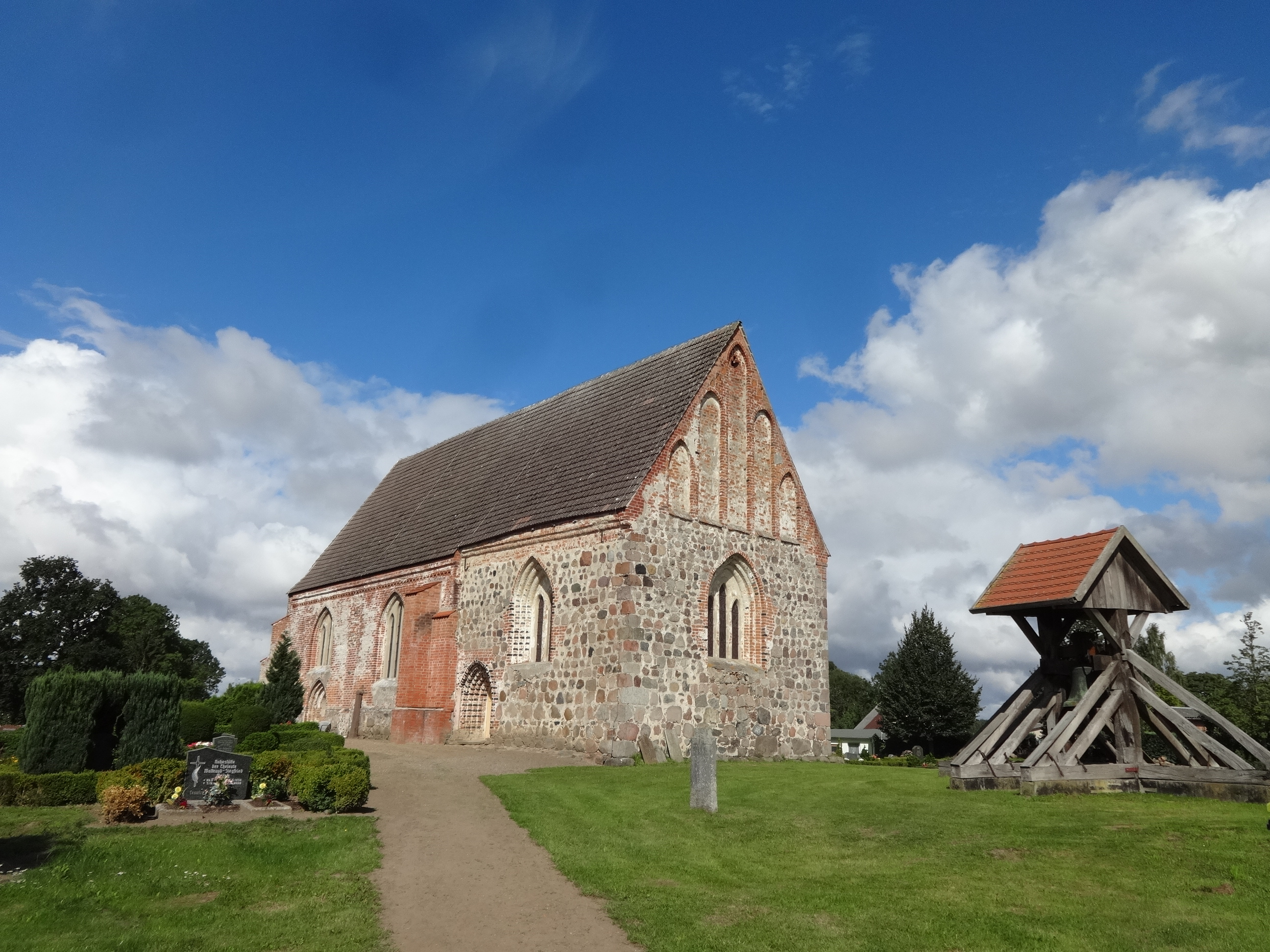 Die Dorfkirche Sassen entstand im 13. Jahrhundert aus Feldsteinen und wurde vermutlich im 15. Jahrhundert um ein Kirchenschiff aus Mauerstein erweitert. In Innern befindet sich eine Fünte aus der Zeit um 1300. Eine Glasmalerei aus dem 19. Jahrhundert zeigt den Guten Hirten zwischen Petrus und Paulus von Tarsus und stammt vermutlich aus der Glasmalereianstalt Ferdinand Müller in Quedlinburg.